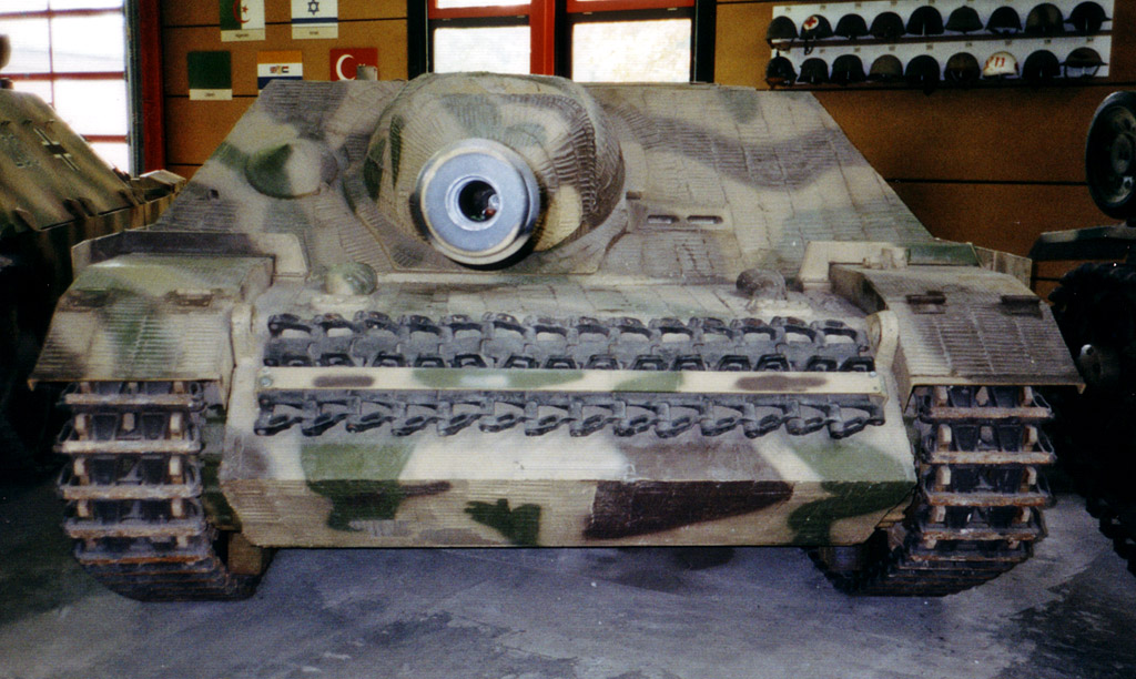 Jagdpanzer IV Panzerjäger 39 (Sd.Kfz. 162), ausgestellt im Panzermuseum Munster